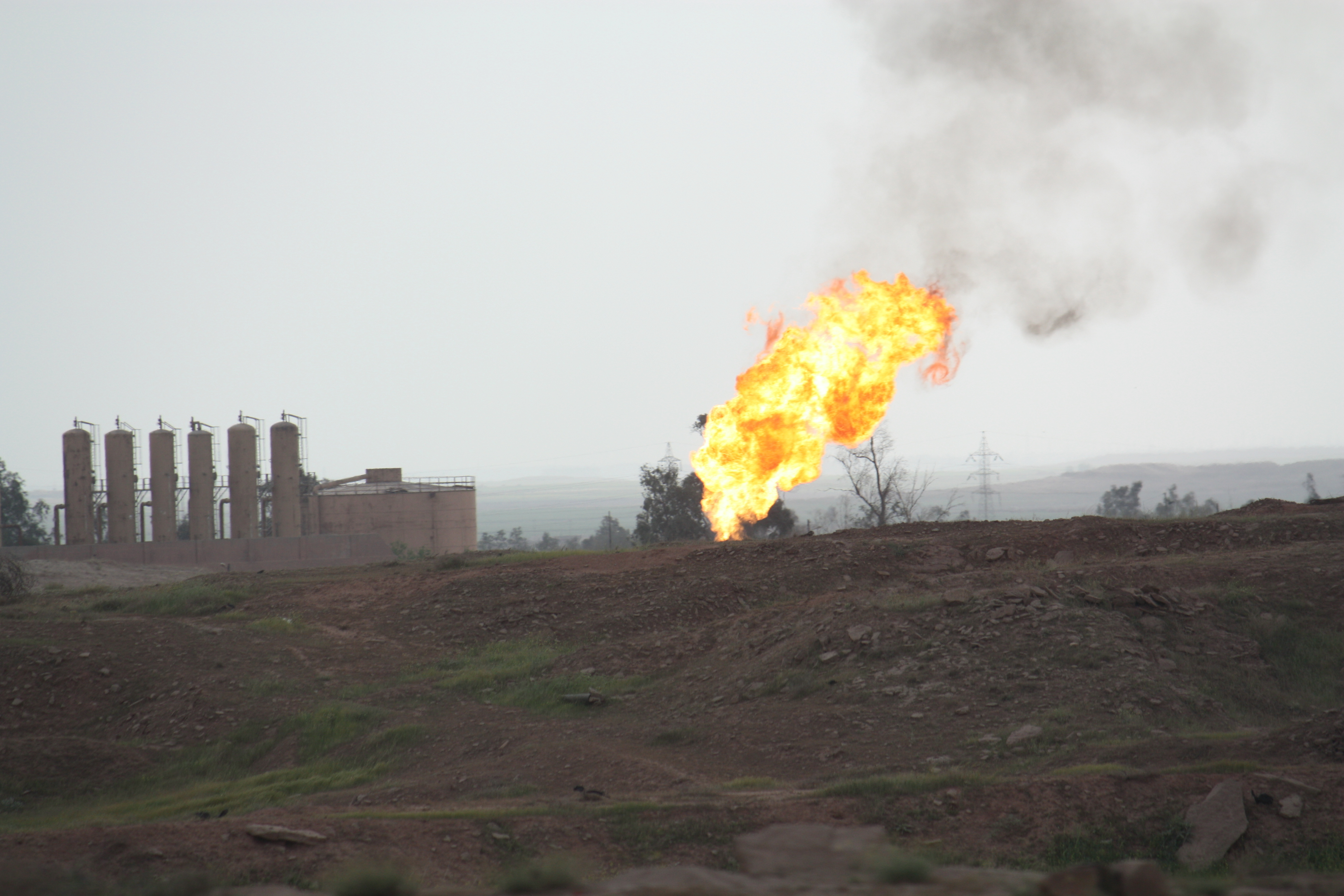 بئر نفط في كركوك